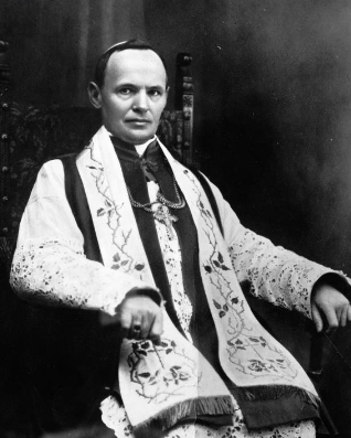 Biskup Franciszek Sonik